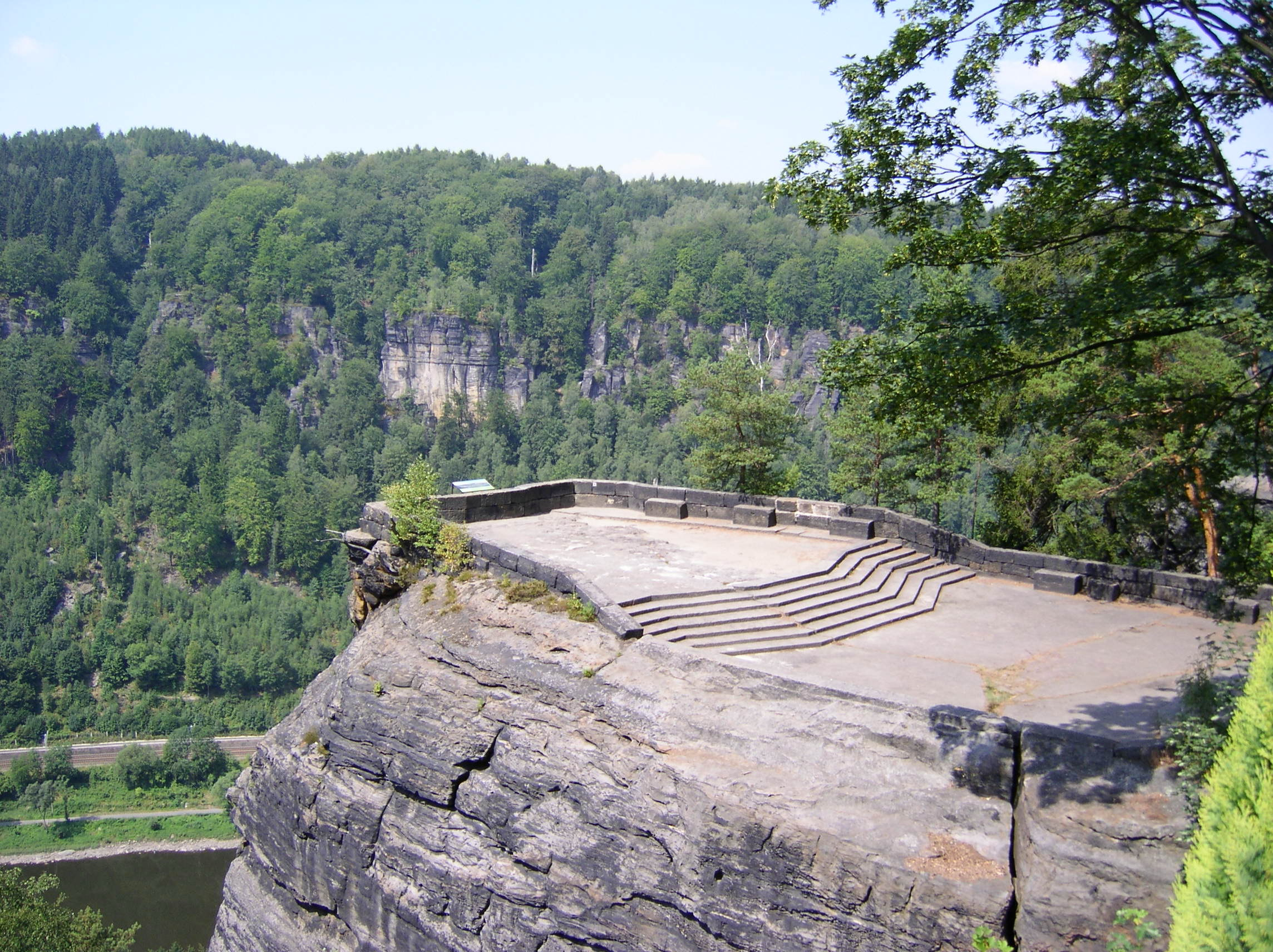 Sicht auf die Aussichtsplattform des Belveder. Das Foto wurde von mir 2006 gemacht.